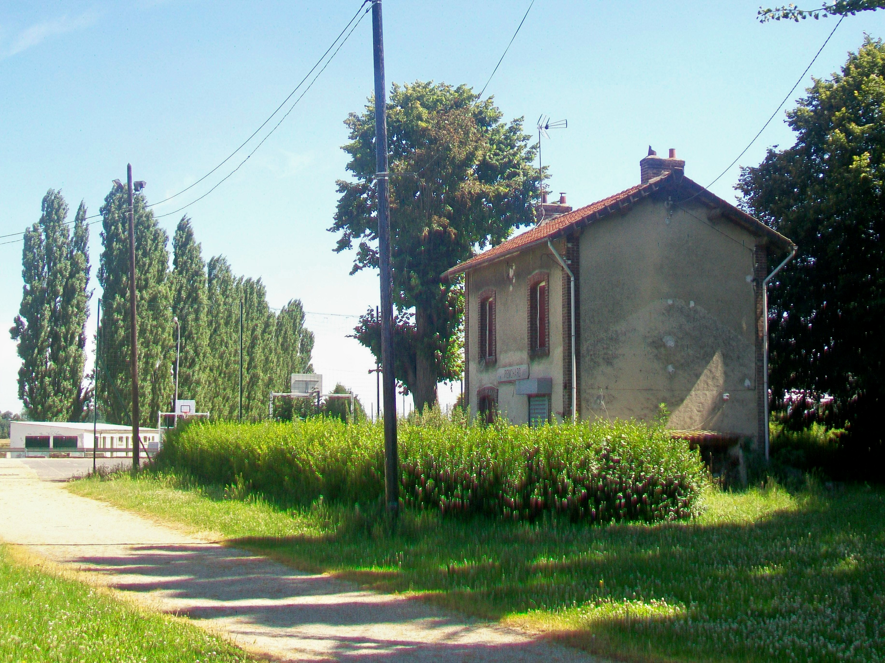 L'ancienne gare de Penchard du tramway de Meaux à Dammartin, côté voies, vue depuis le nord-est, en direction de Meaux. Le village est à droite.